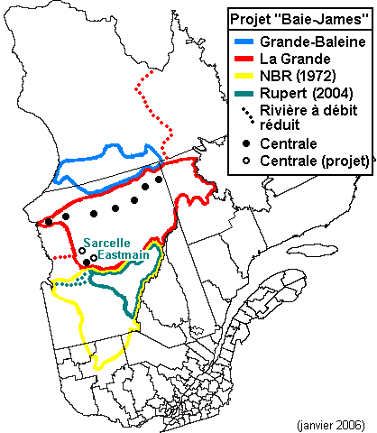 Bassins versants visés par le projet de la Baie-James (Grande rivière de la Baleine, suspendu en 1994; La Grande Rivière; Nottaway-Broadback-Rupert (NBR), projet de 1972, suspendu; Rupert, 2004, en processus d'évaluation environnementale). Modification de "Image:Quejam2.PNG".